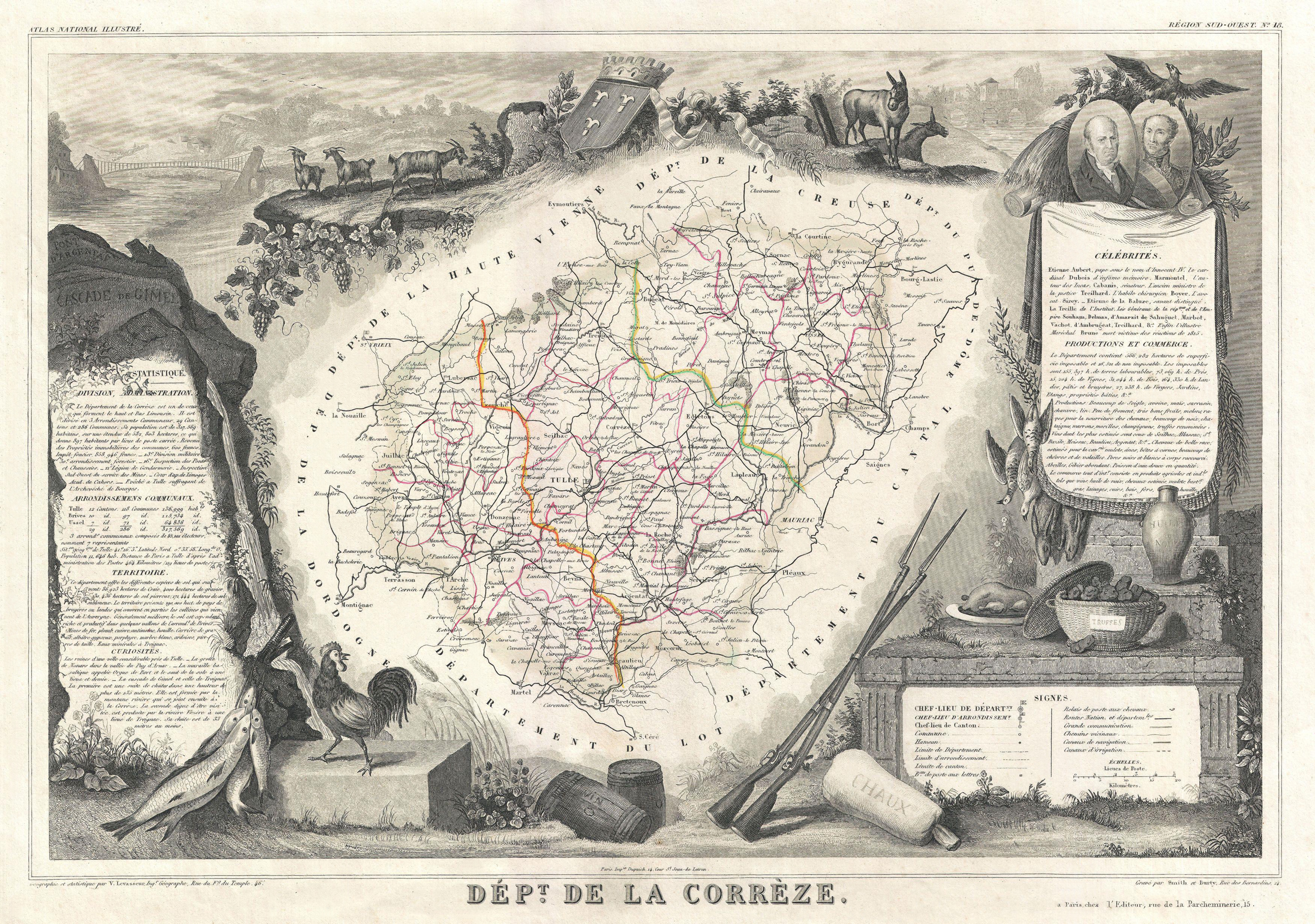 Map of Correze department, France